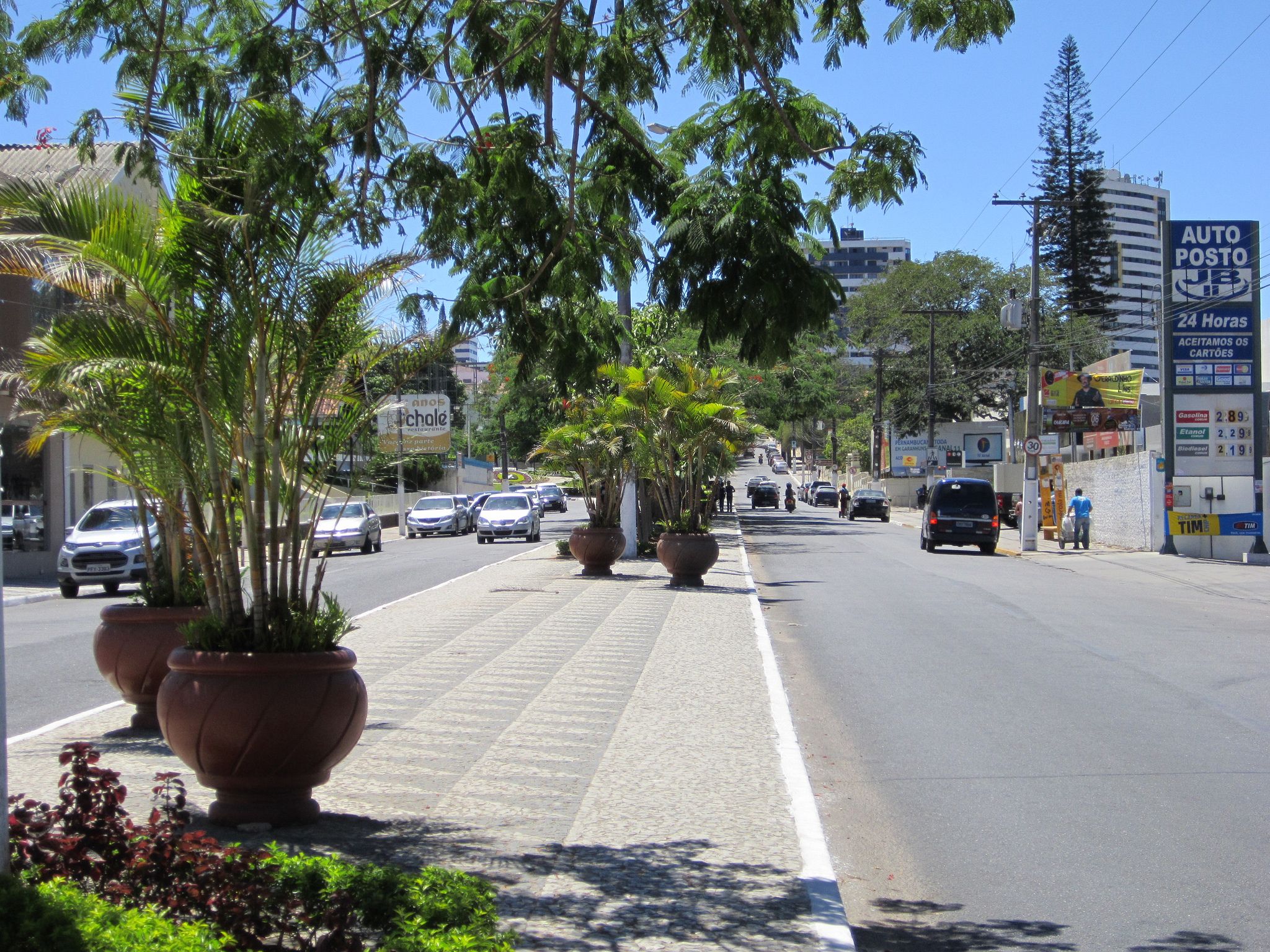 Avenida Rui Barbosa, Heliópolis - Garanhuns - Pernambuco - Brasil